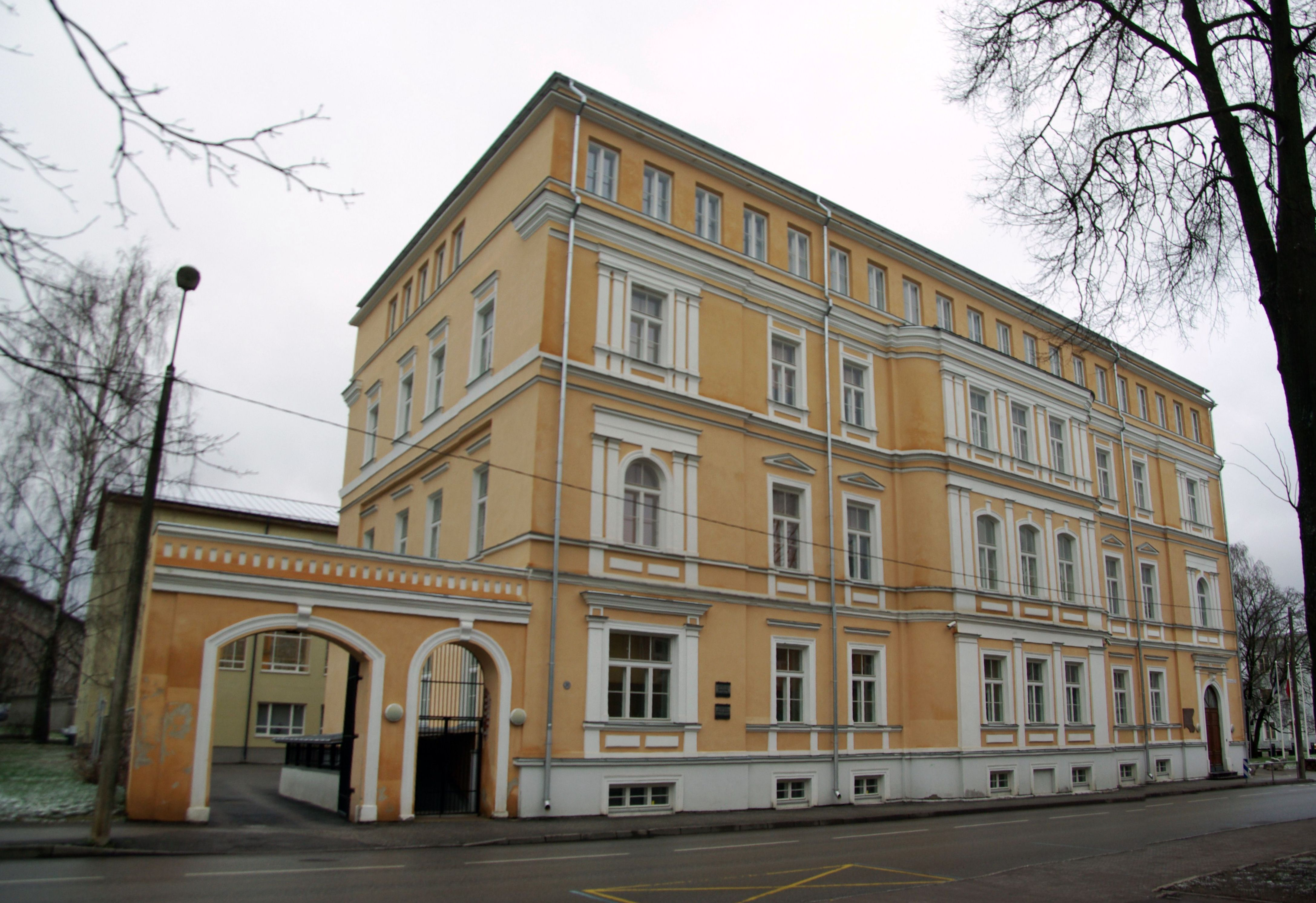 Gümnaasium Tartus, Vanemuise 35.